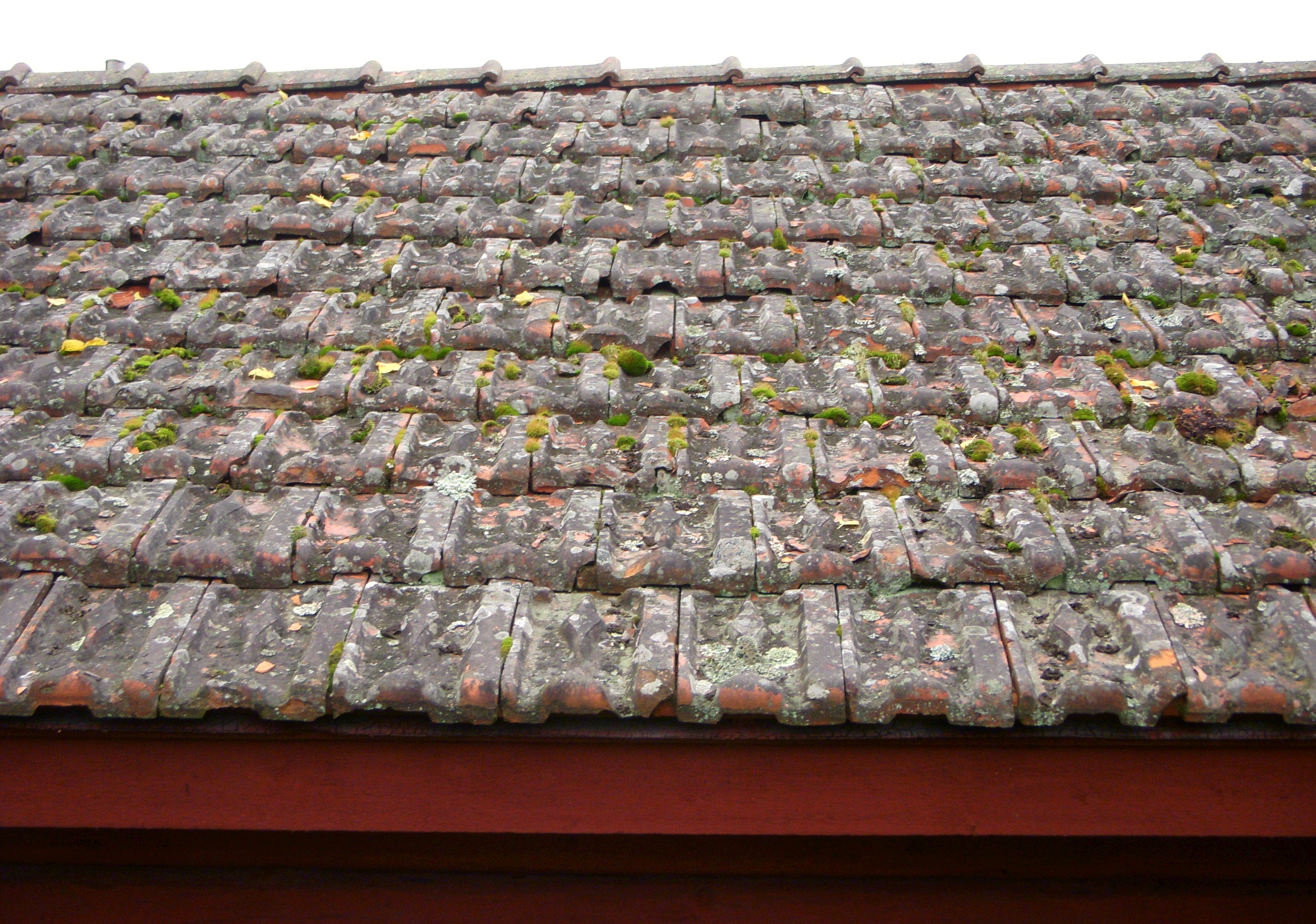 Hjärttegel på gruvarbetarebostaden i Ludvika Gammelgård